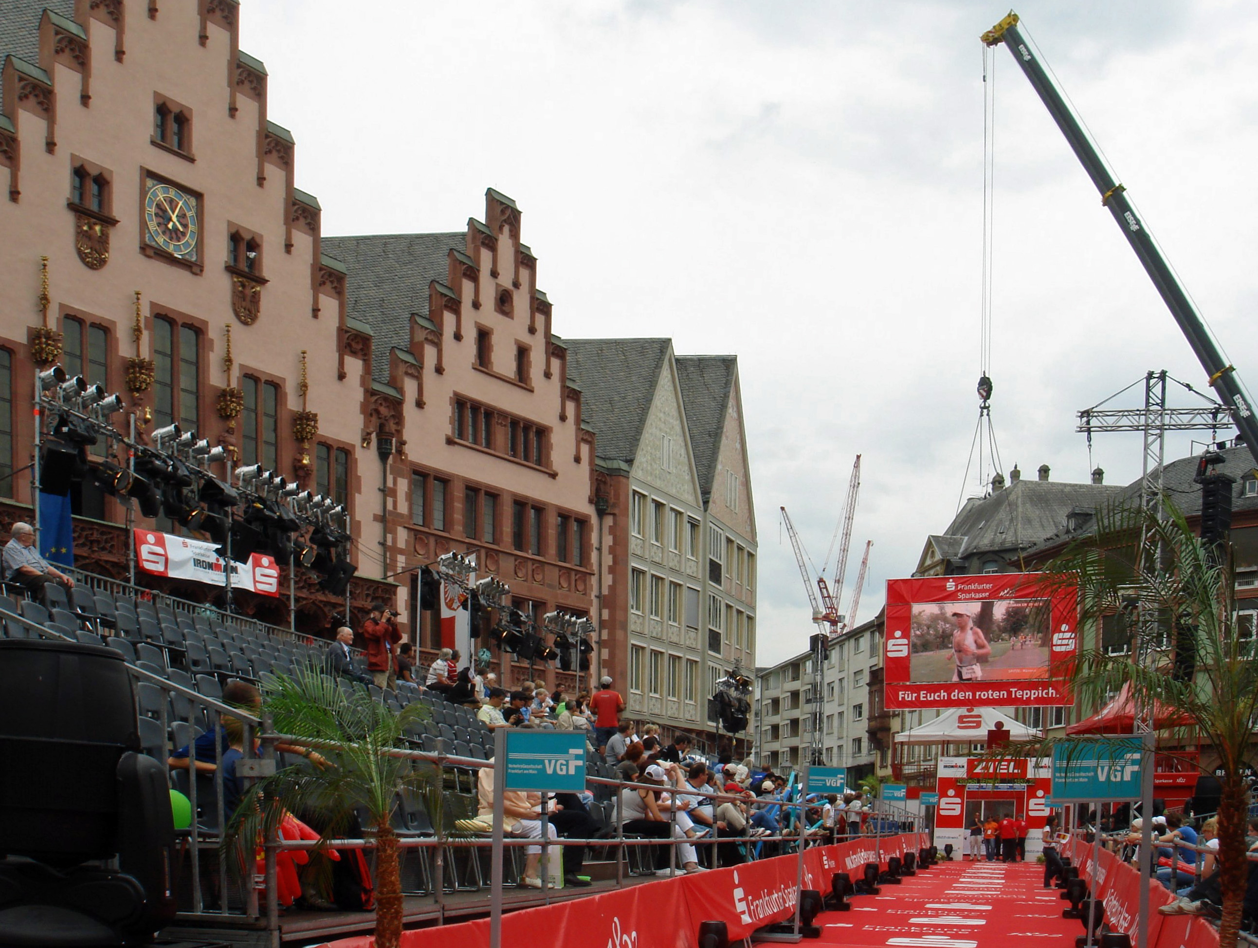 Ironman Germany in Frankfurt, 2007, Ziel auf dem Römerberg